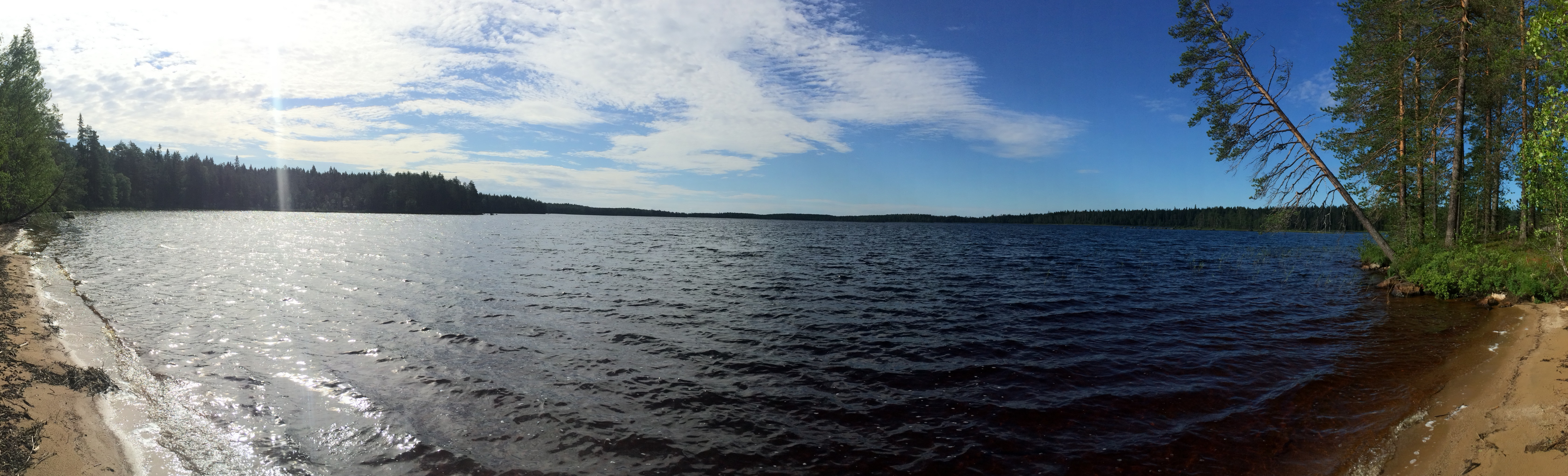 Хиетаярви